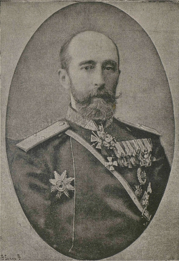 Никола́й Миха́йлович Бара́нов (1837—30 июля 1901) — генерал-лейтенант, градоначальник Санкт-Петербурга (с 21 марта по 24 августа 1881).